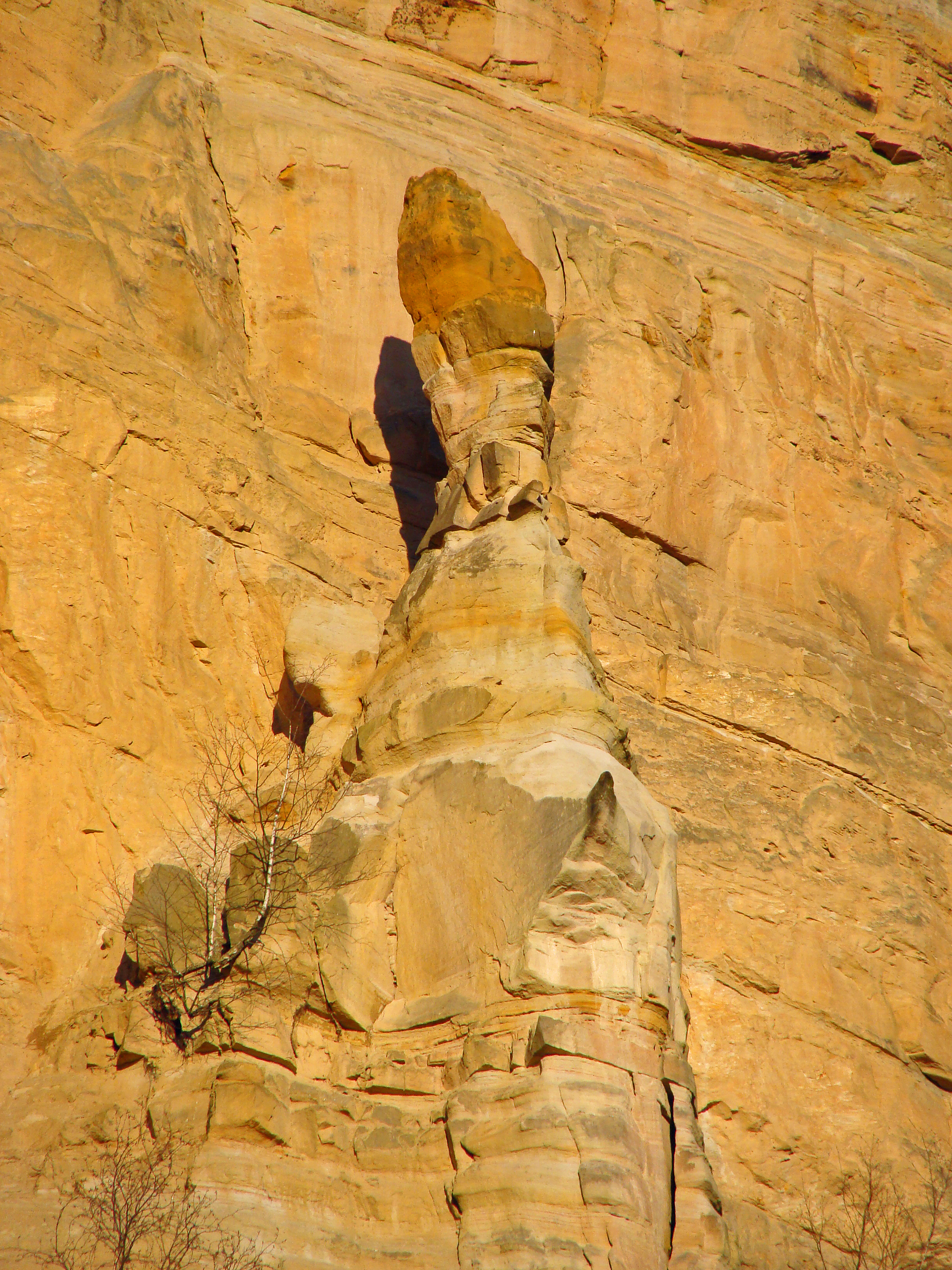 Cheminée de fée, carrière du Barrois (entre les villes de L'Hôpital et Freyming-Merlebach). Photographie prise le 9 mars 2014. Période géologique: Trias (Bundsandstein).